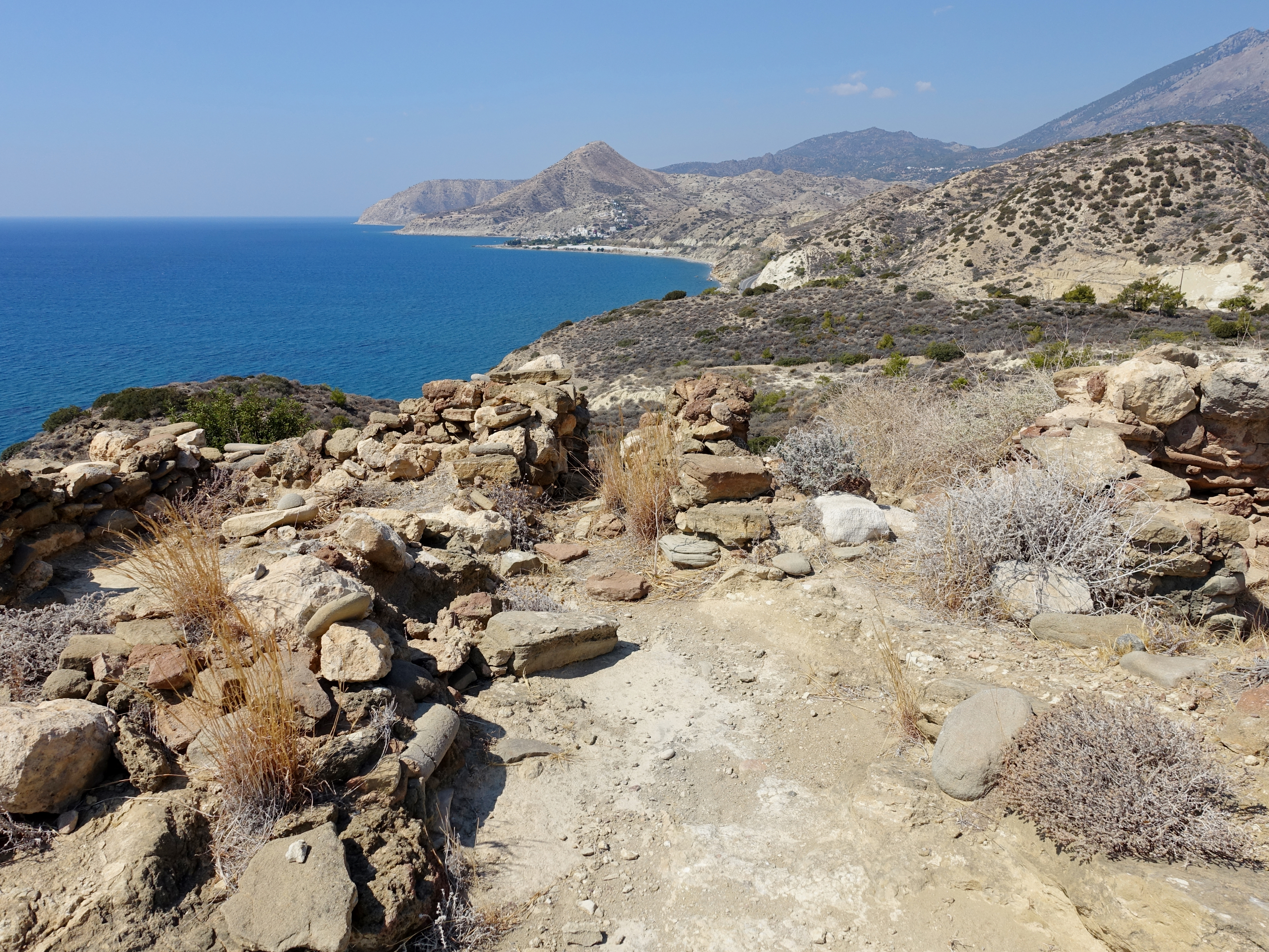 Ausgrabungsstätte von Fournou Koryfi bei Myrtos, Kreta, Griechenland